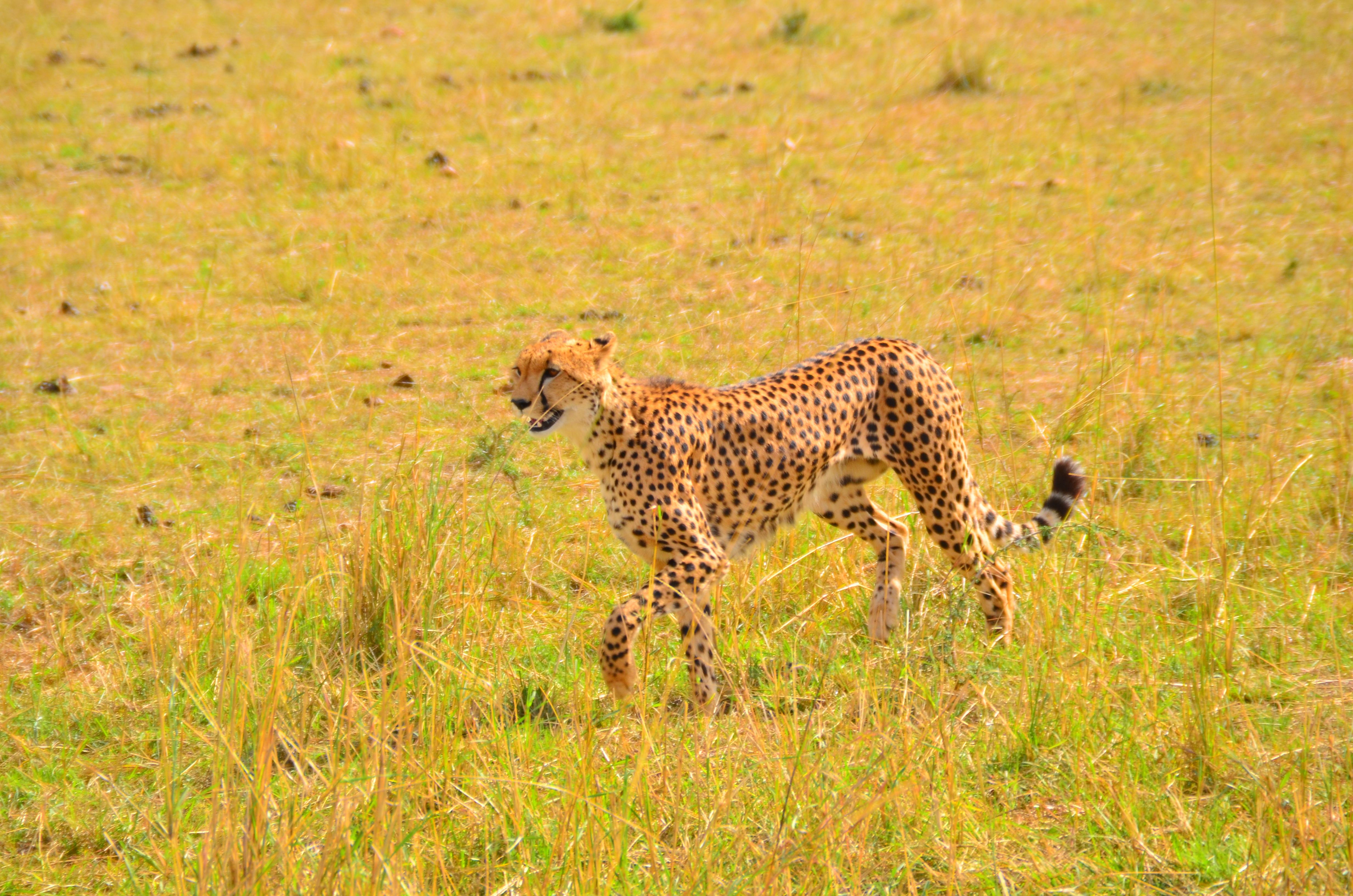 Safari por Kenia